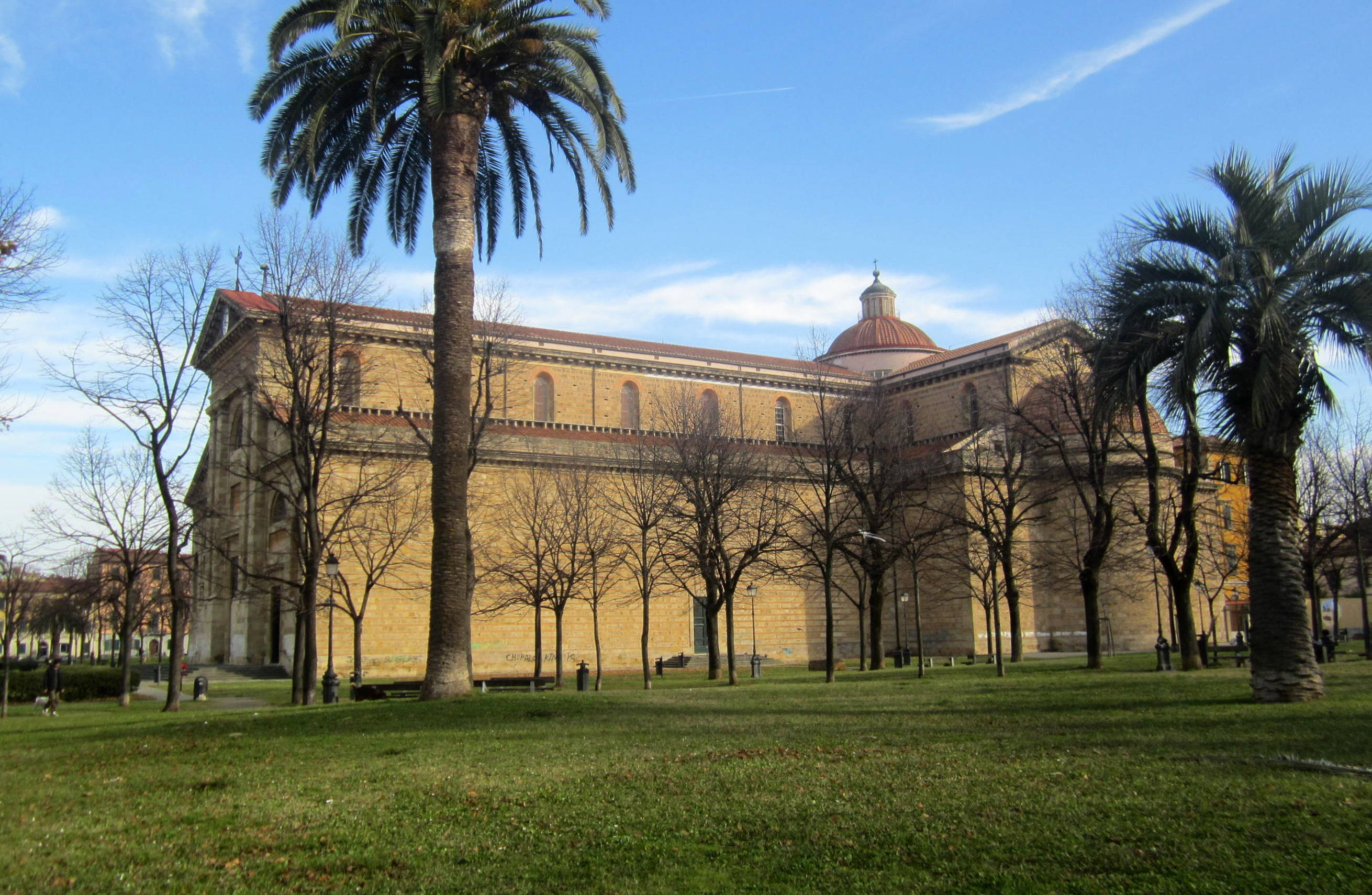 Piazza della Vittoria a Livorno